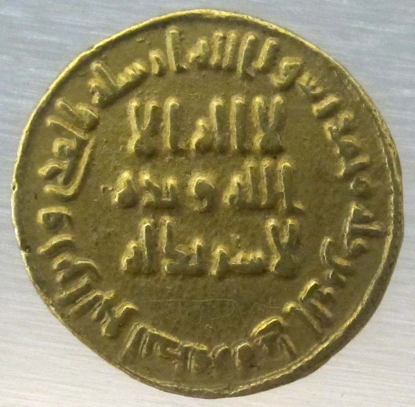 Siria (damasco), califfo abd'el malek, dinar omayyade, 685-705